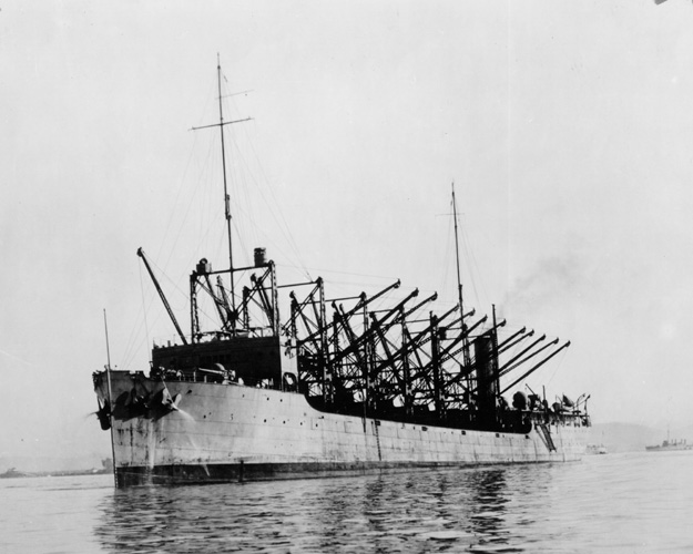 USS Proteus (AC-9)